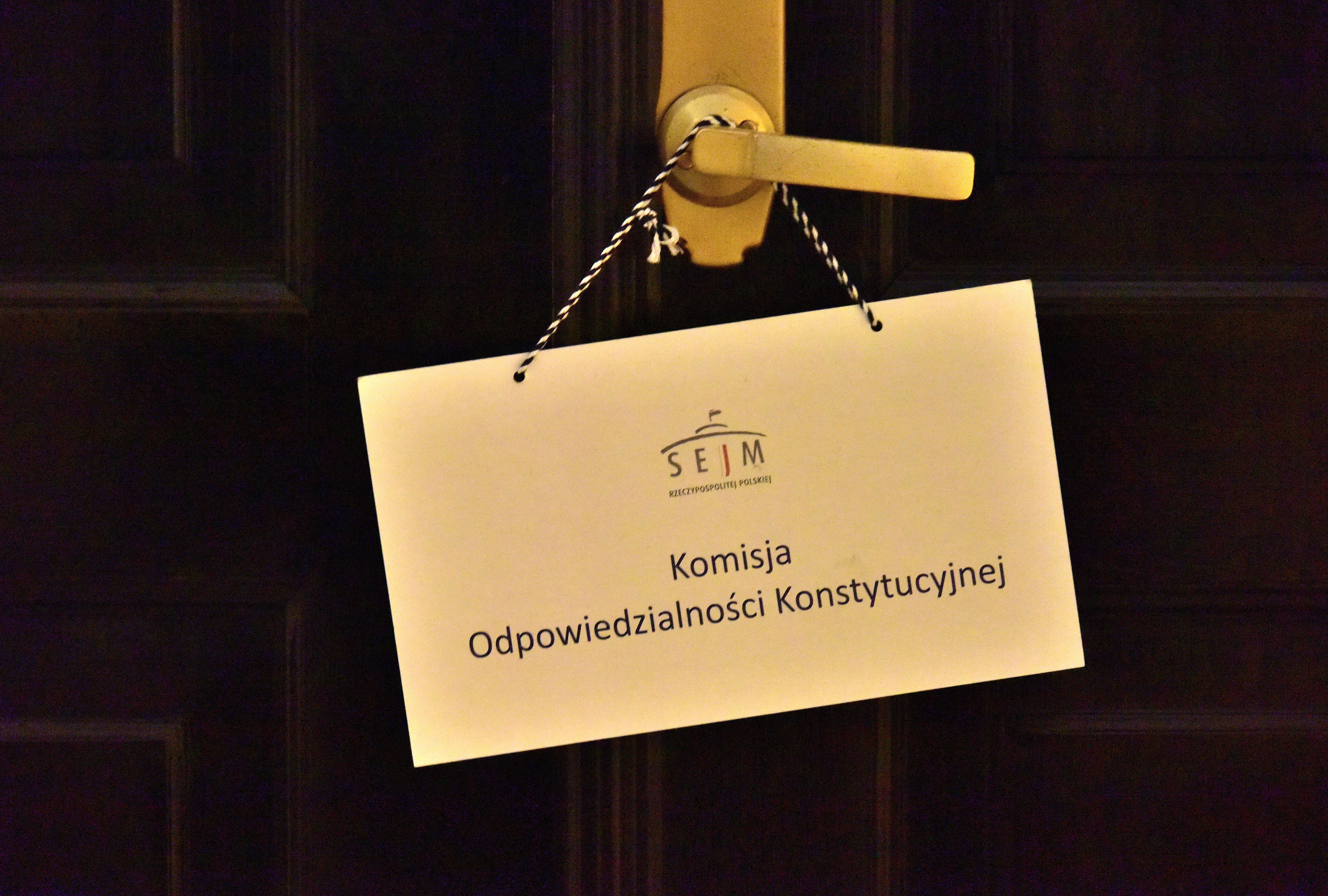 Informacja o trwającym posiedzeniu sejmowej Komisji Odpowiedzialności Konstytucyjnej w Sejmie